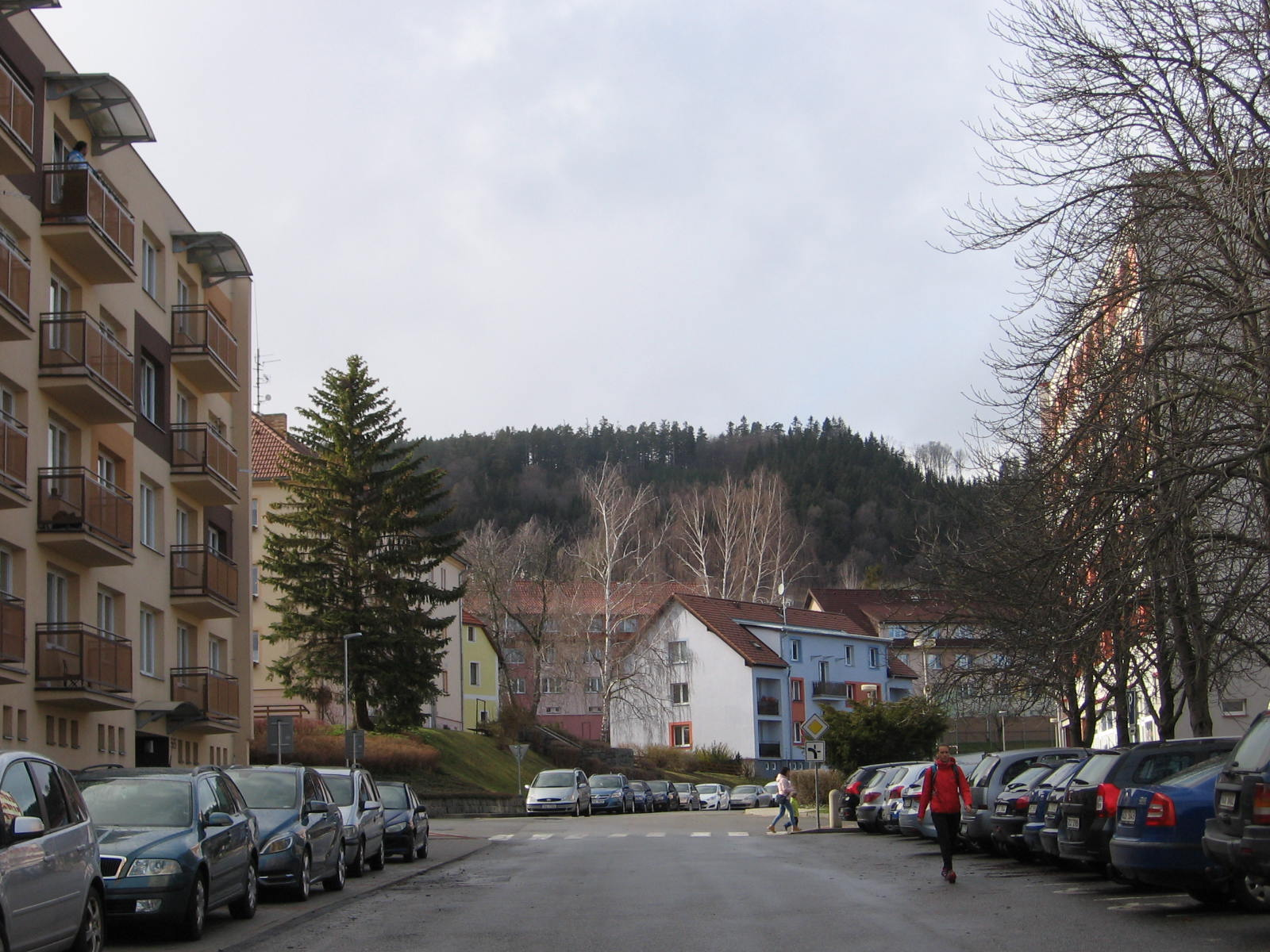 Prachatice za Gymnáziem severozápadní část ulice SNP